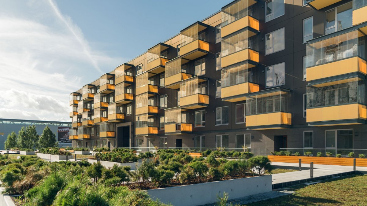 Skanstes parks